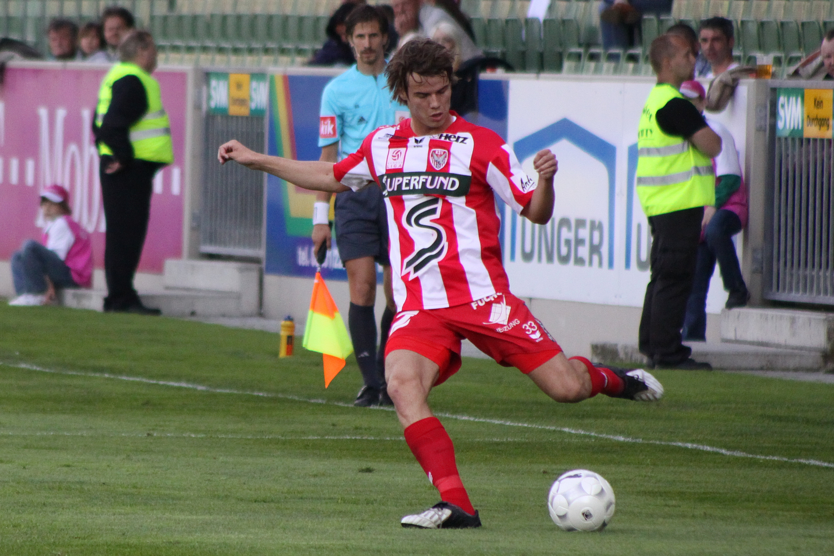 Miroslav Stepanek – Kapfenberger SV (quer)